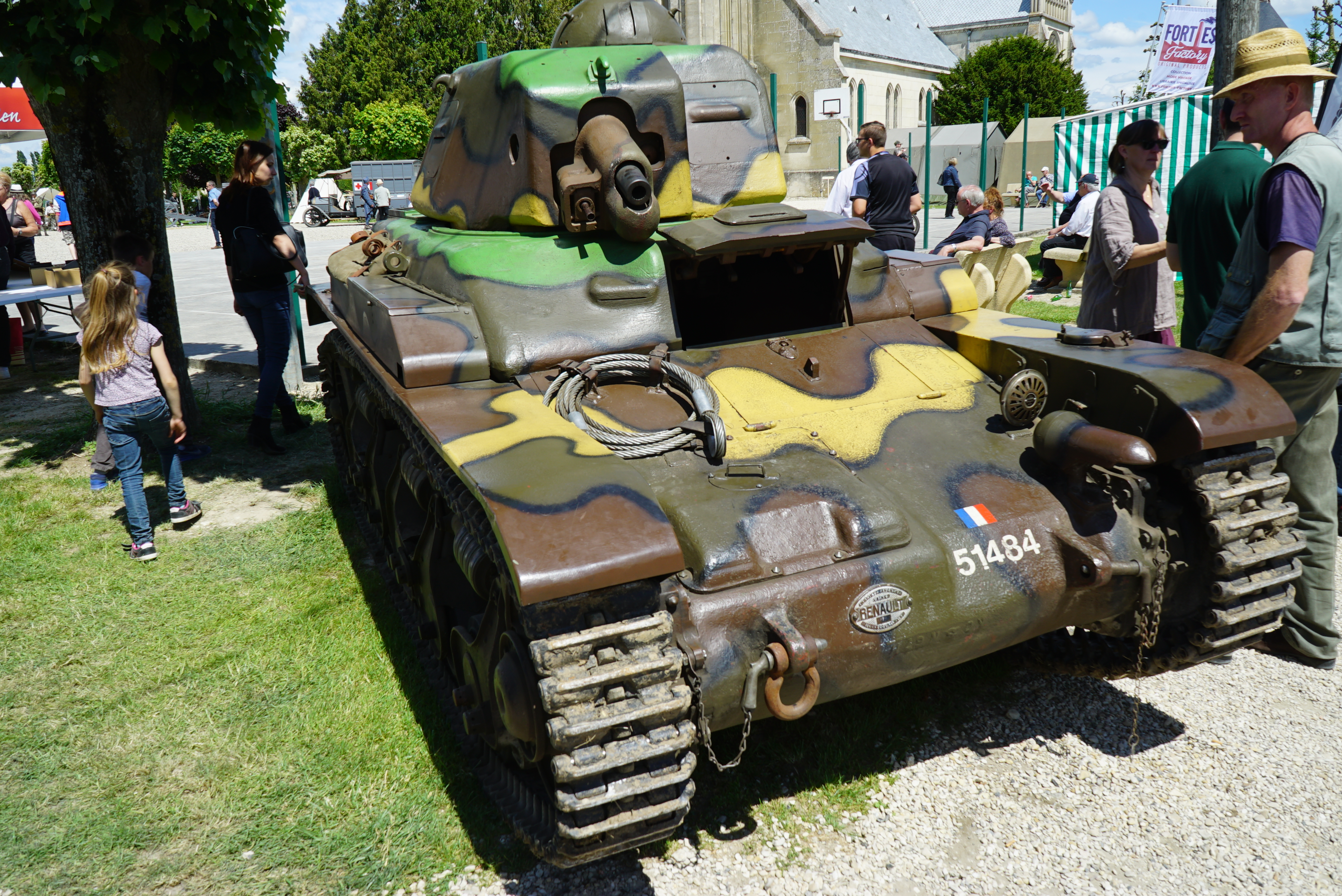 animation pour le centenaire de l'offensive Nivelle.